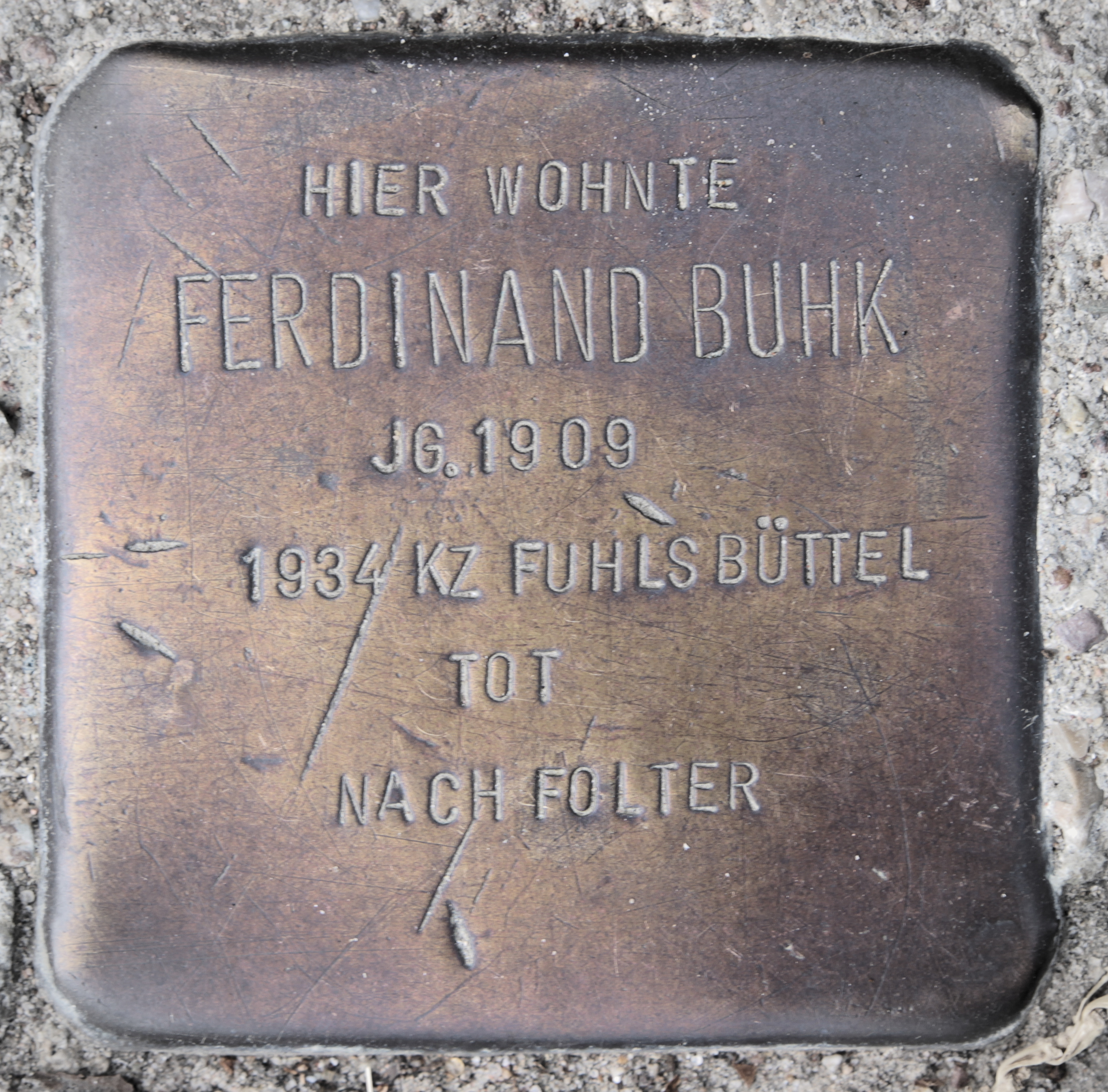 Stolperstein für Ferdinand Buhk in der Rothenhauschaussee 217 in Hamburg-Bergedorf